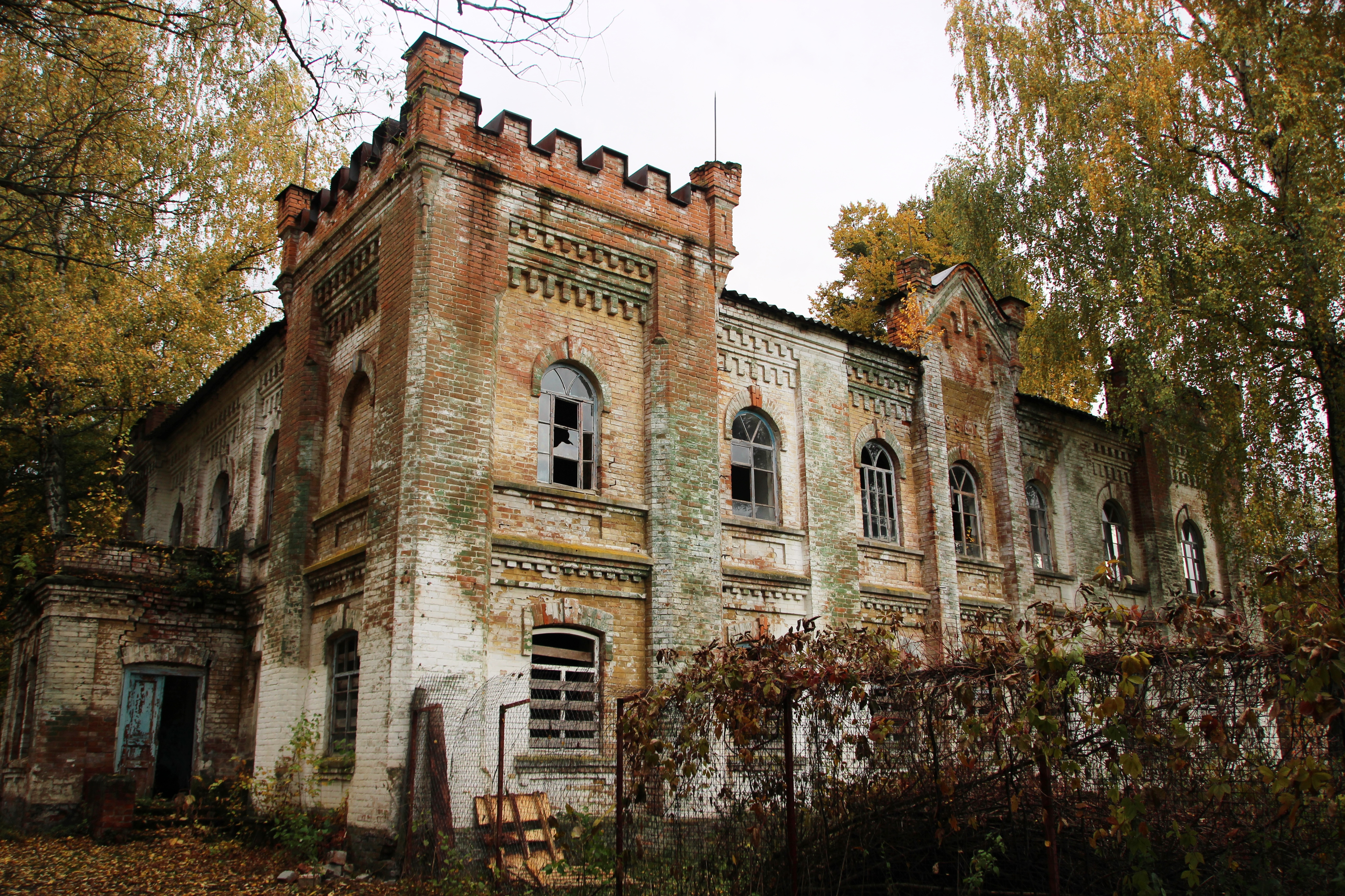 Казарма робітників економії (мур.), село Лифине, вул. Лифинська